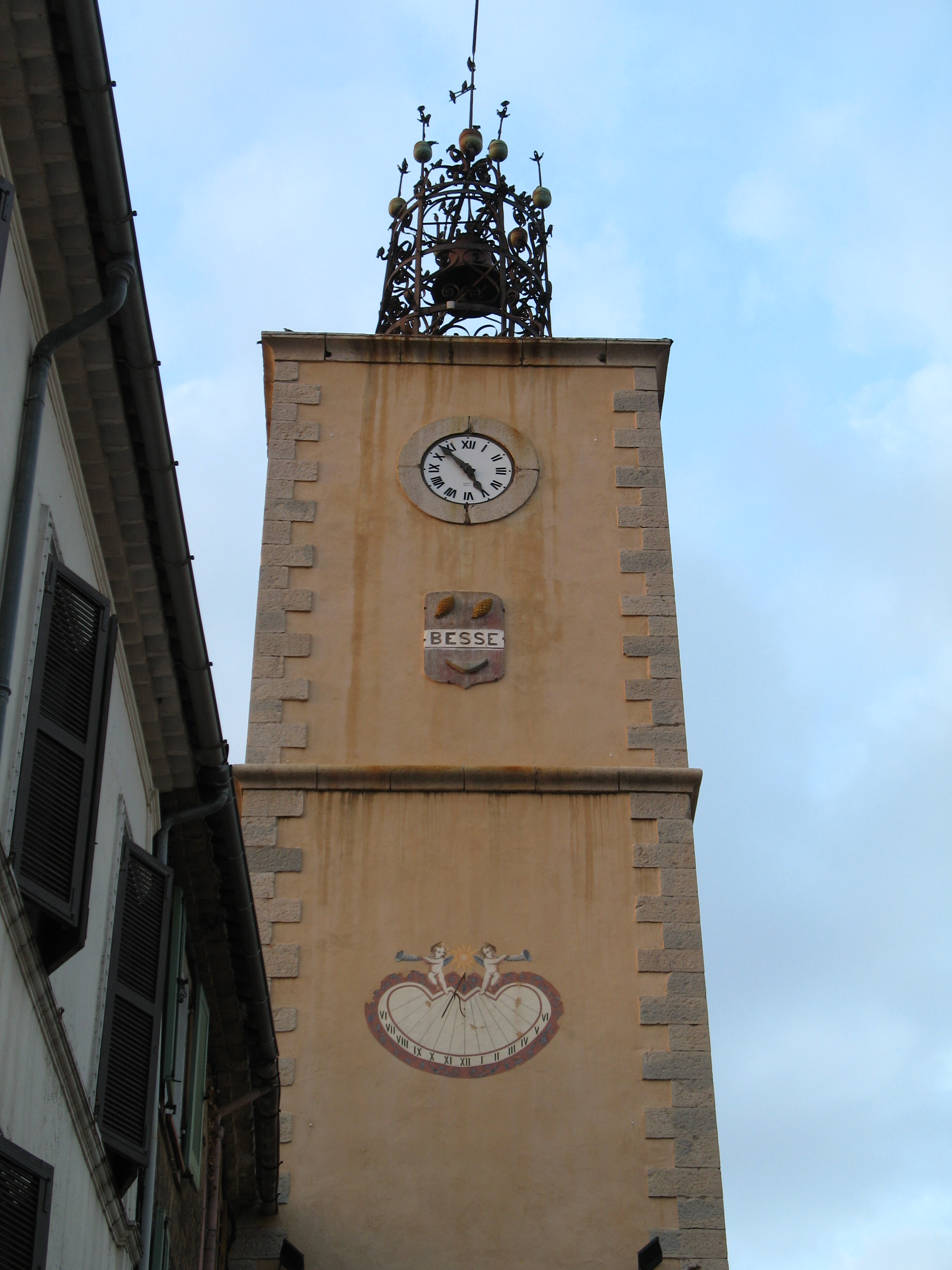 Beffroi Besse-sur-Issole .